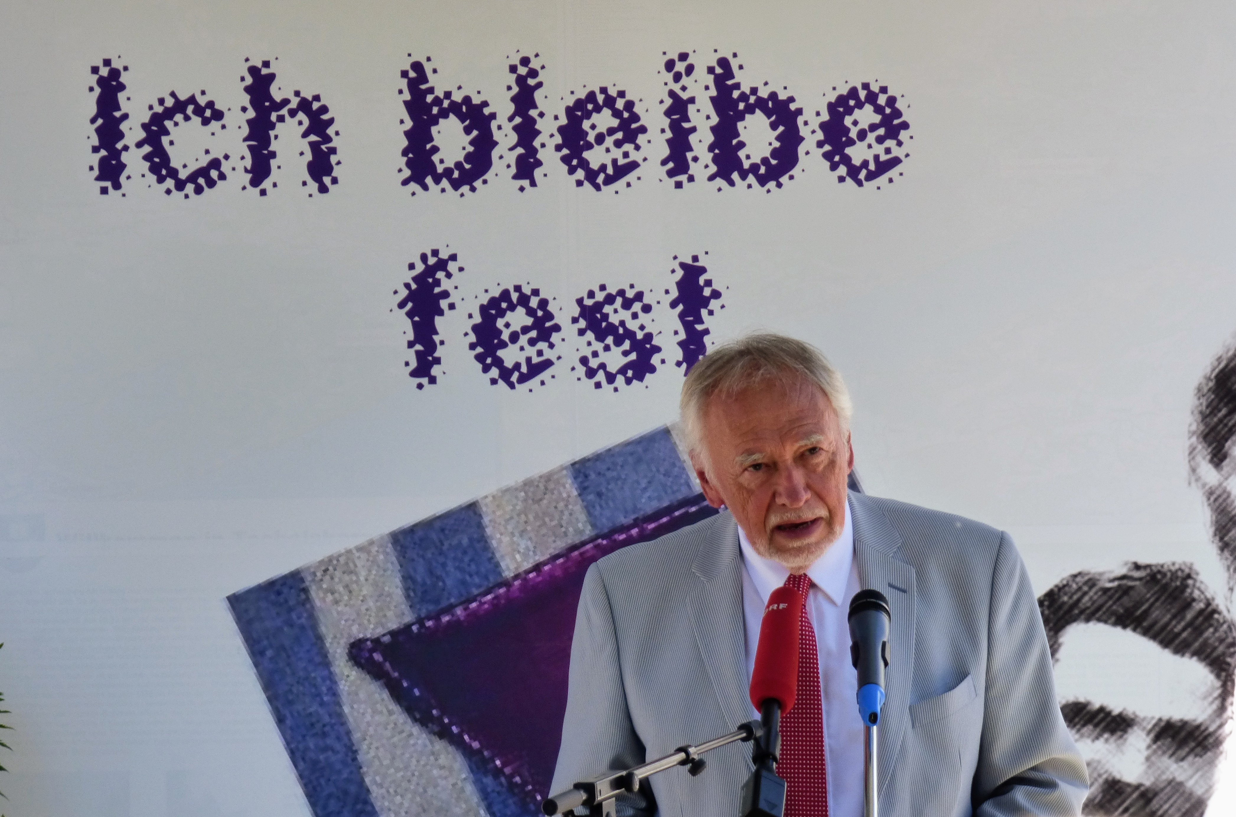 Veranstaltung am 19. Mai 2017, Töschling (Gemeinde Techelsberg): Enthüllung der Tafel zum Gedenken der Zeugen Jehovas aus Techelsberg, die als Wehrdienstverweigerer aus Glaubensgründen Opfer des NS-Regimes wurden. Redner Peter Gstettner (Mauthausenkomitee Kärnten)